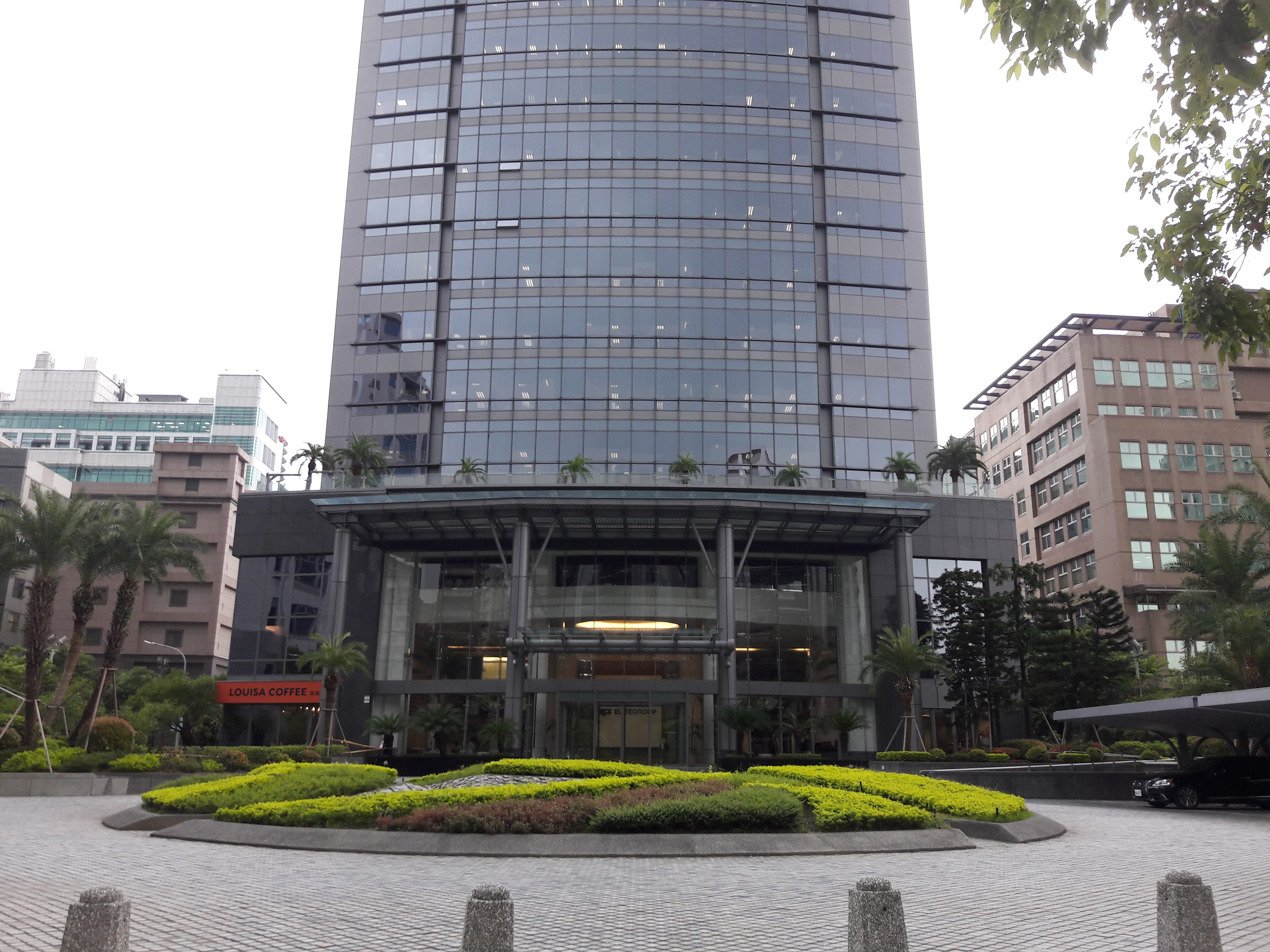 精英電腦總部大樓大門。